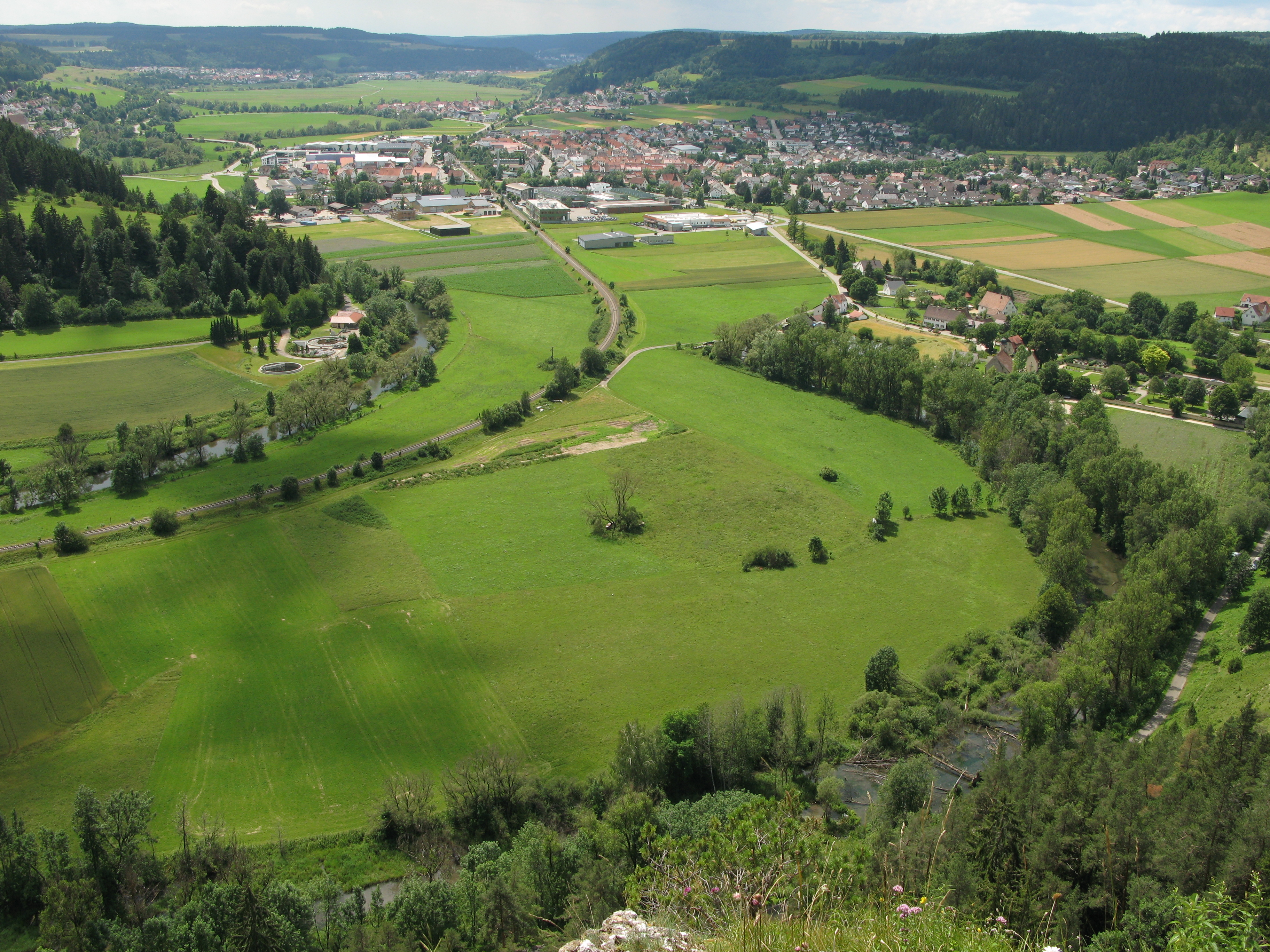 Die Donau und Mühlheim gesehen vom Gelber Fels am Donauberglandweg auf der Schwäbischen Alb.